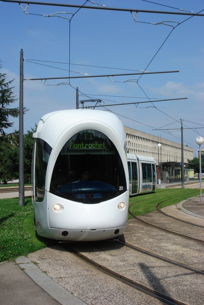 Rame de la Ligne T1 tramway de Lyon.